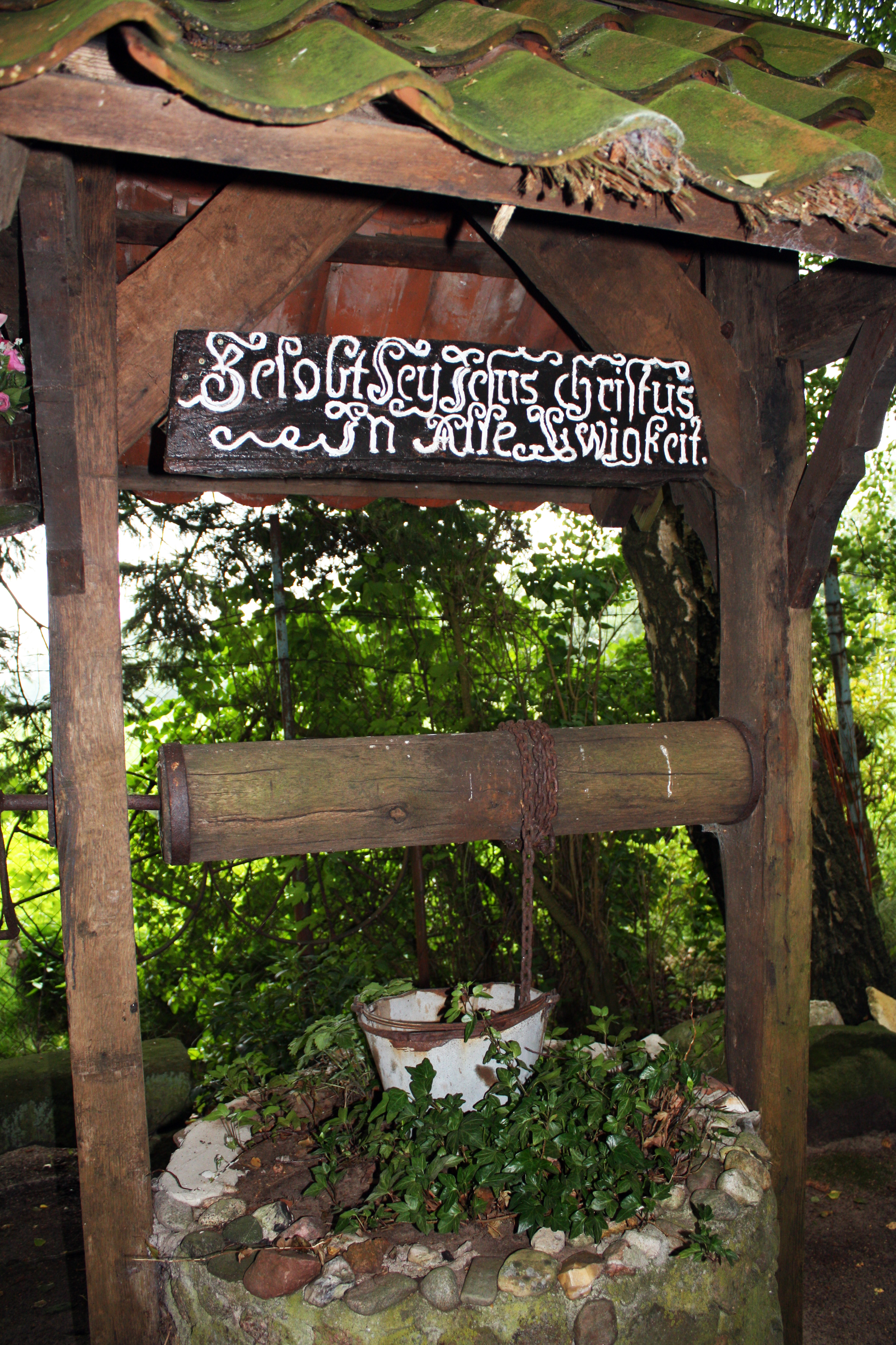 Gerste-Bregenbeck. Kettenbrunnen Hof H. Jaske